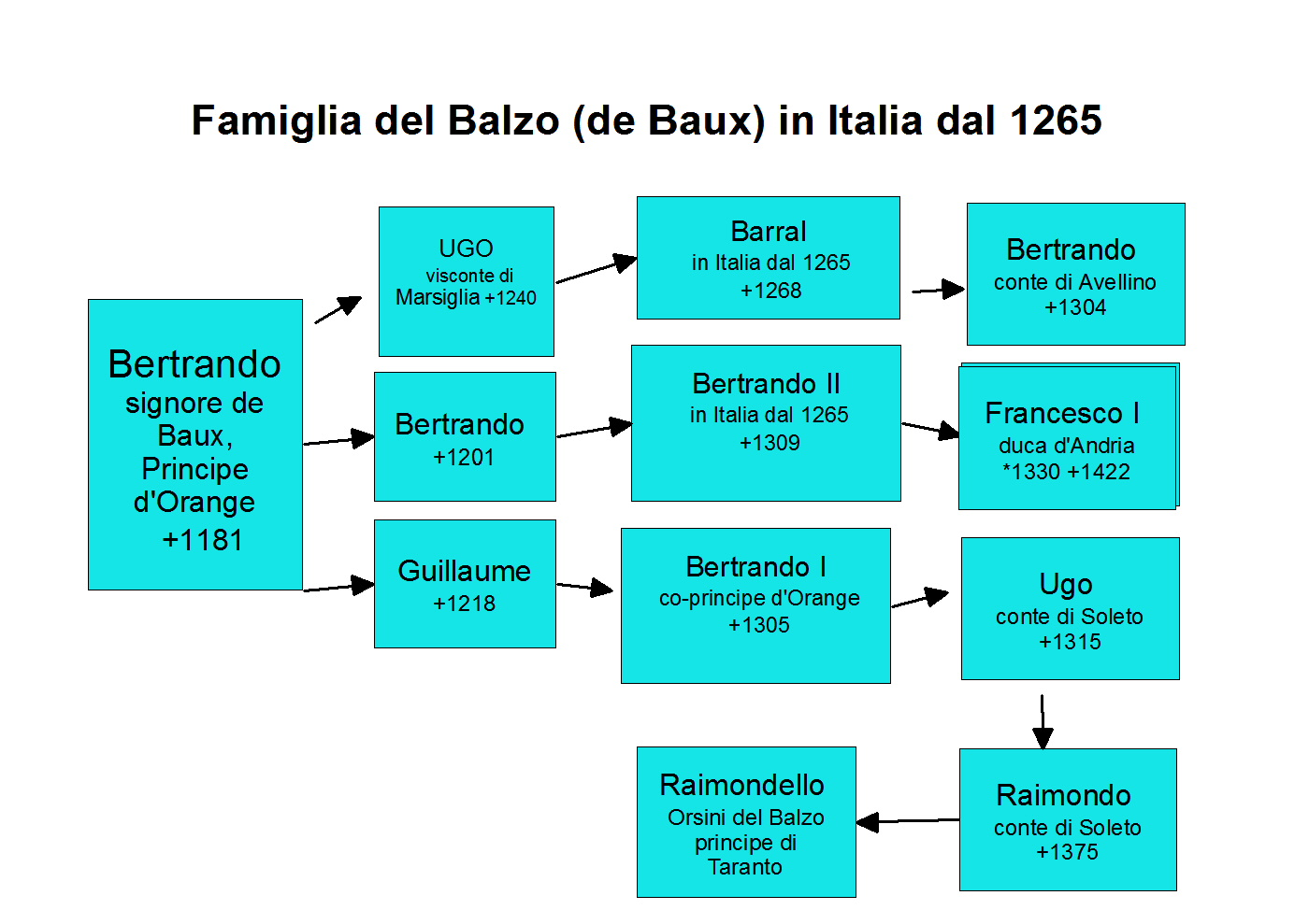 Fusanton